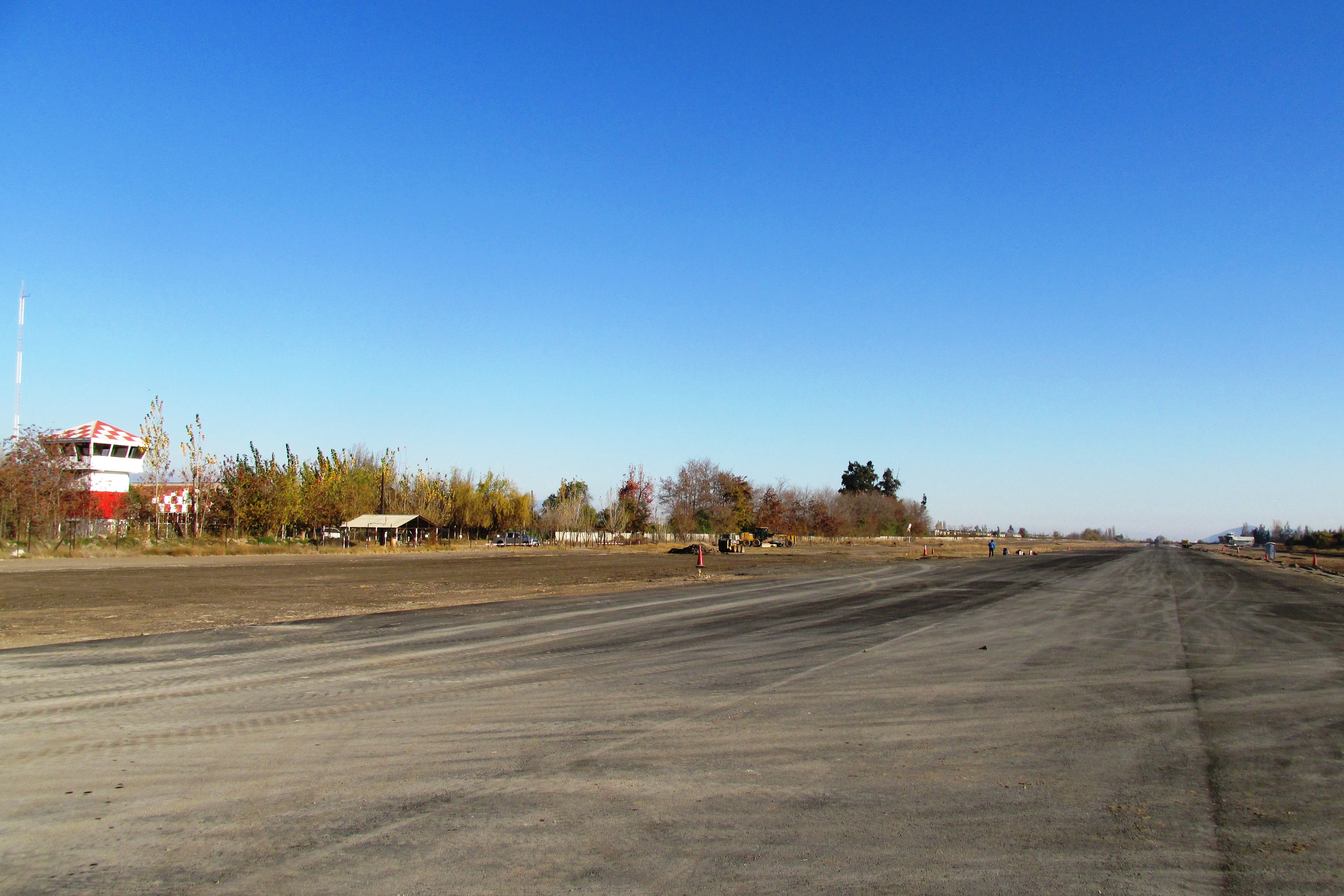 Vista Aeródromo La Independencia en comuna de Rancagua Chile